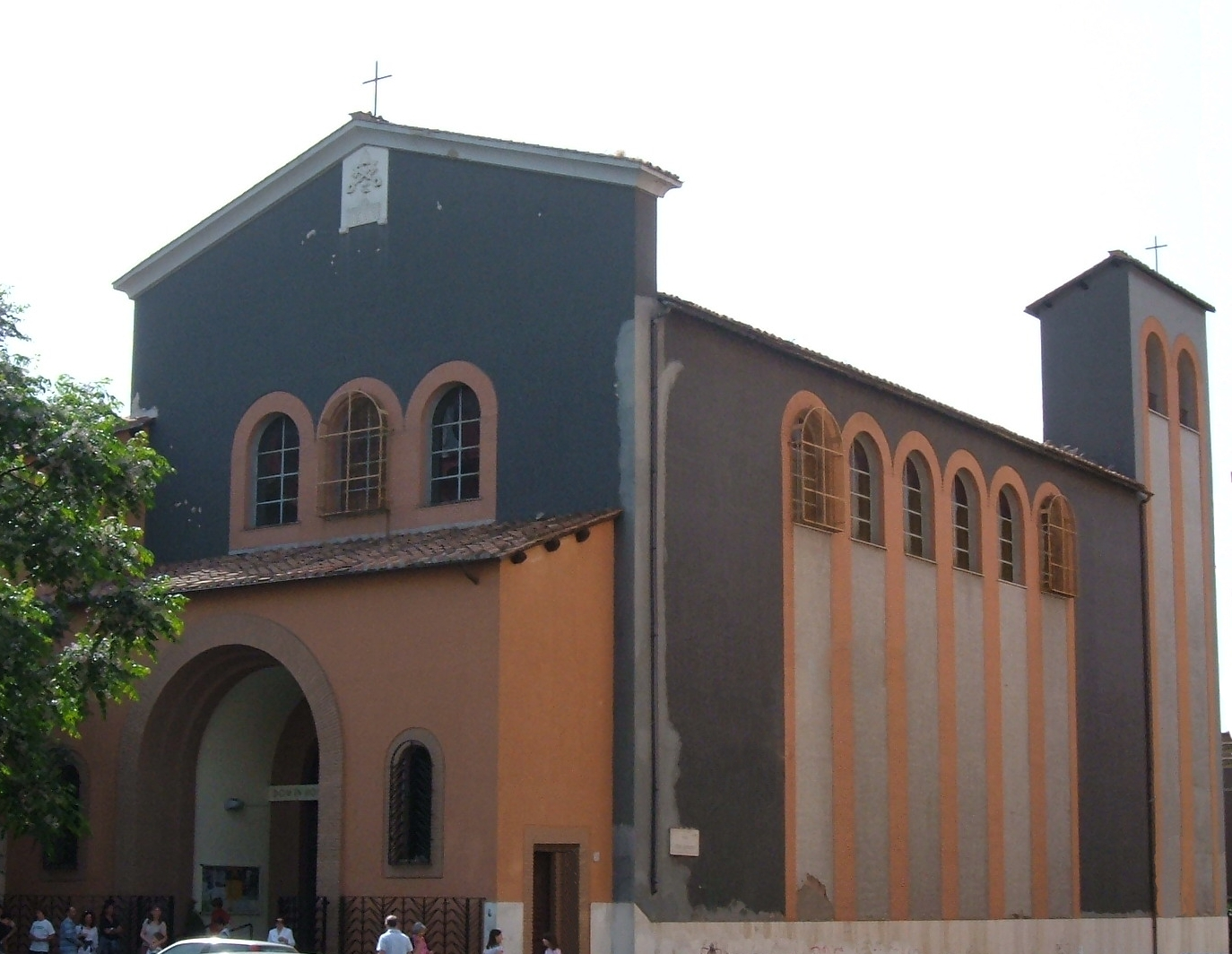 Chiesa di Santa Paola romana, a Roma, nel quartiere Trionfale.